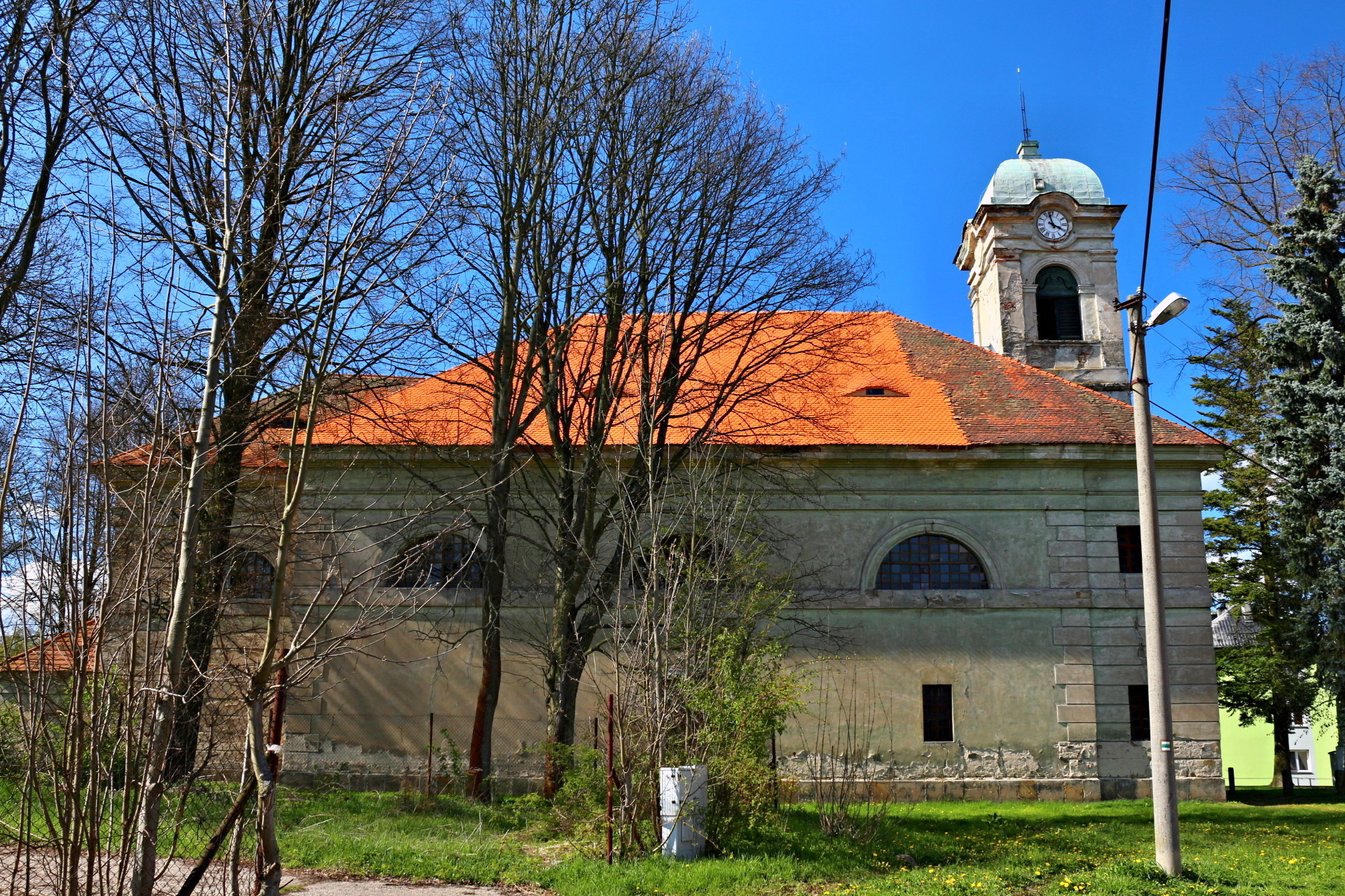 Kostel Povýšení sv. Kříže ve Cvikově